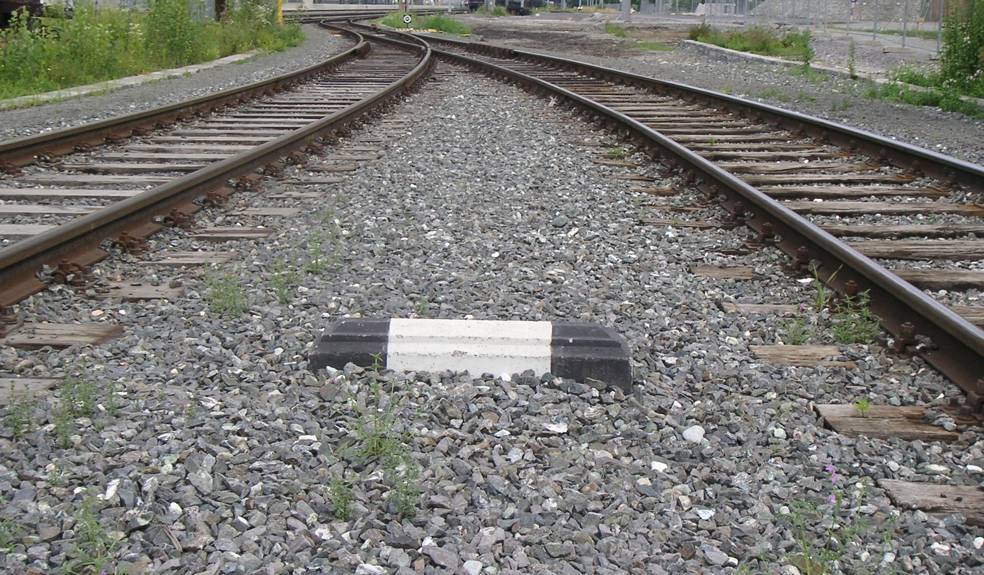 Grenzmarke